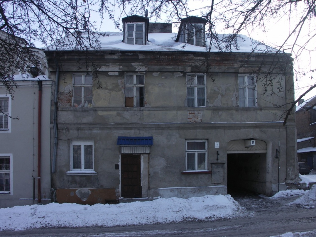 Włocławska kamienica przy Starym Rynku 13.